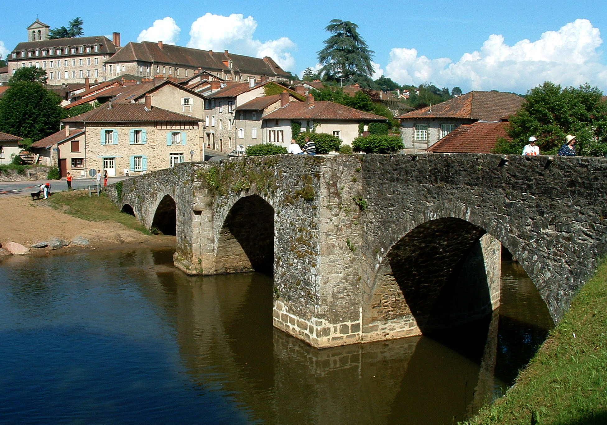 Solignac - La ville et l'abbaye vues du pont roman